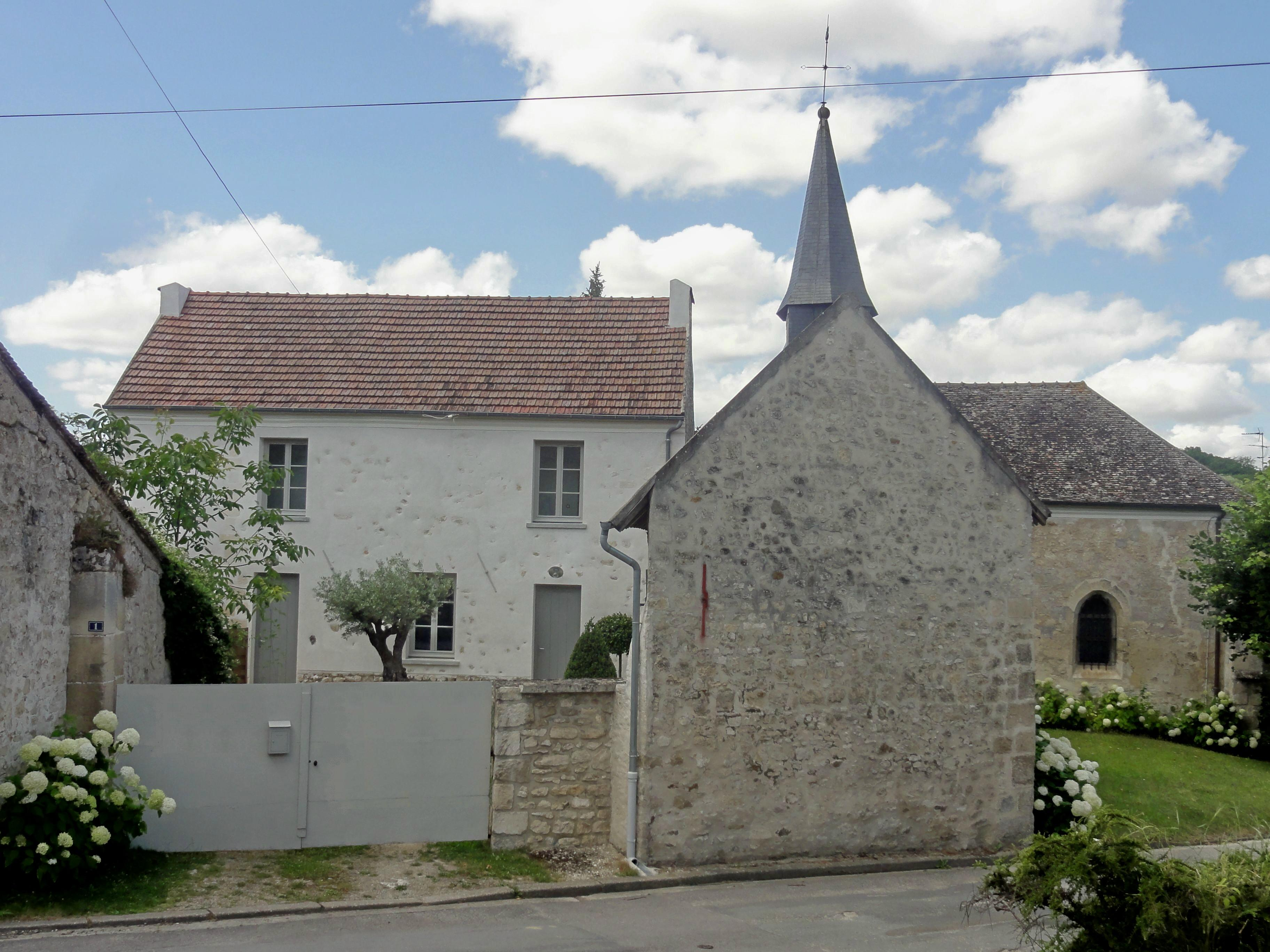 Ancien presbytère (à gauche).